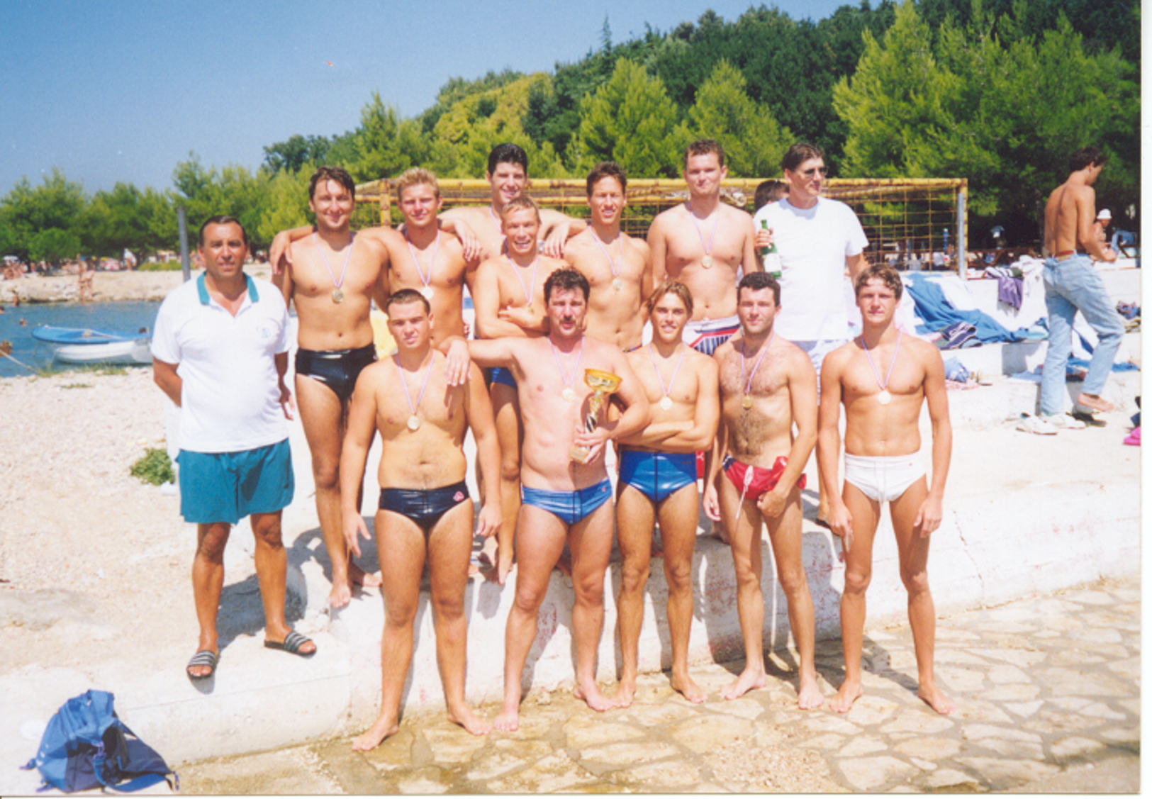 Prvaci iz 1994